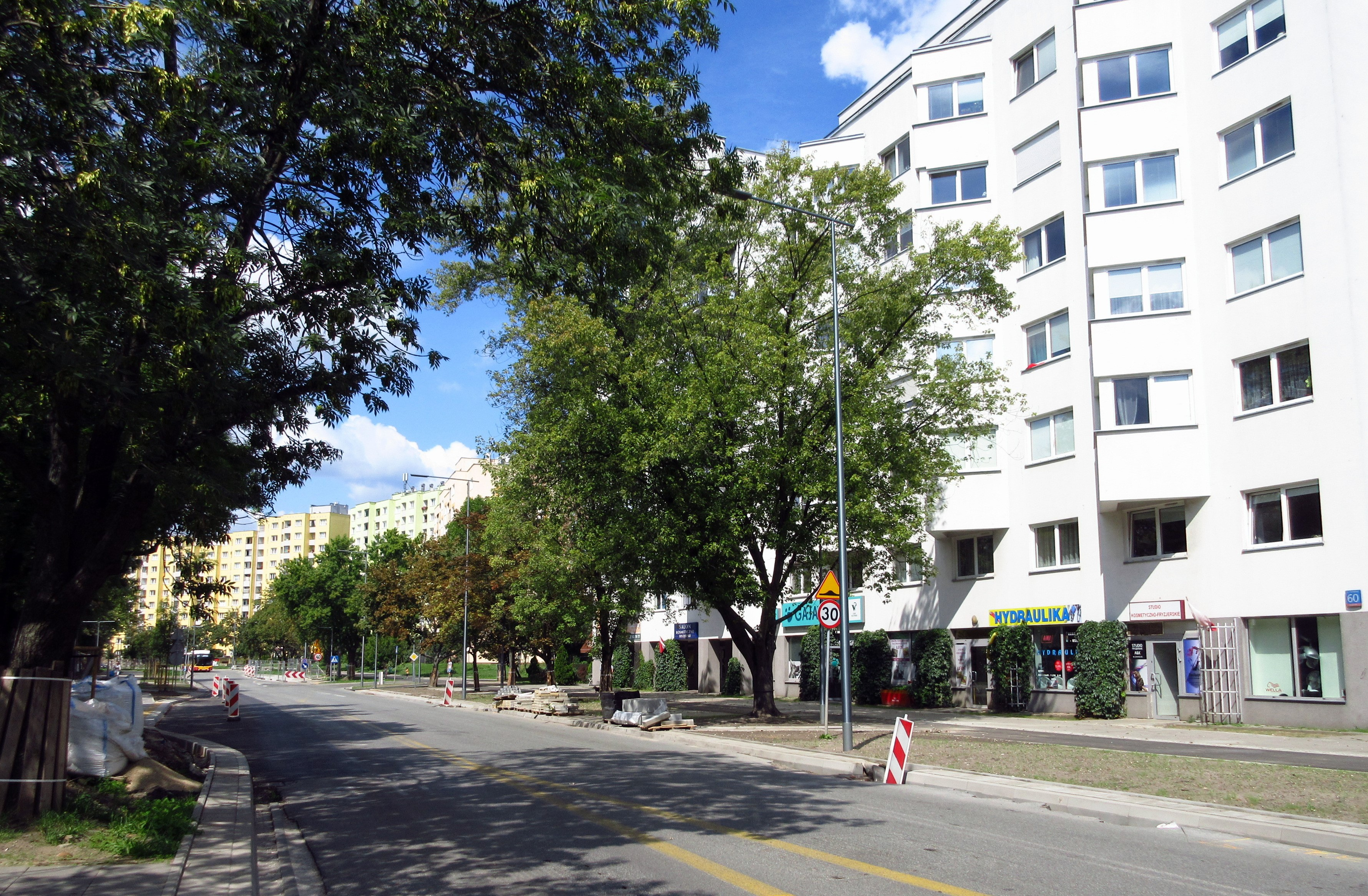 Widok w stronę ulicy Lusińskiej, na wysokości parku Wiecha.